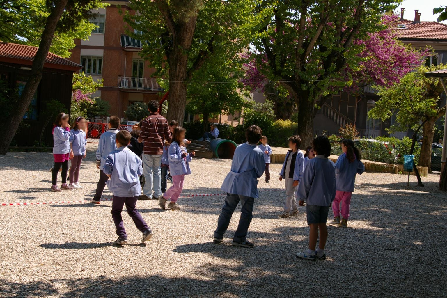 Centro Educativo Svizzero di Rimini - Un momento di gioco durante la ricreazione. primavera 2011